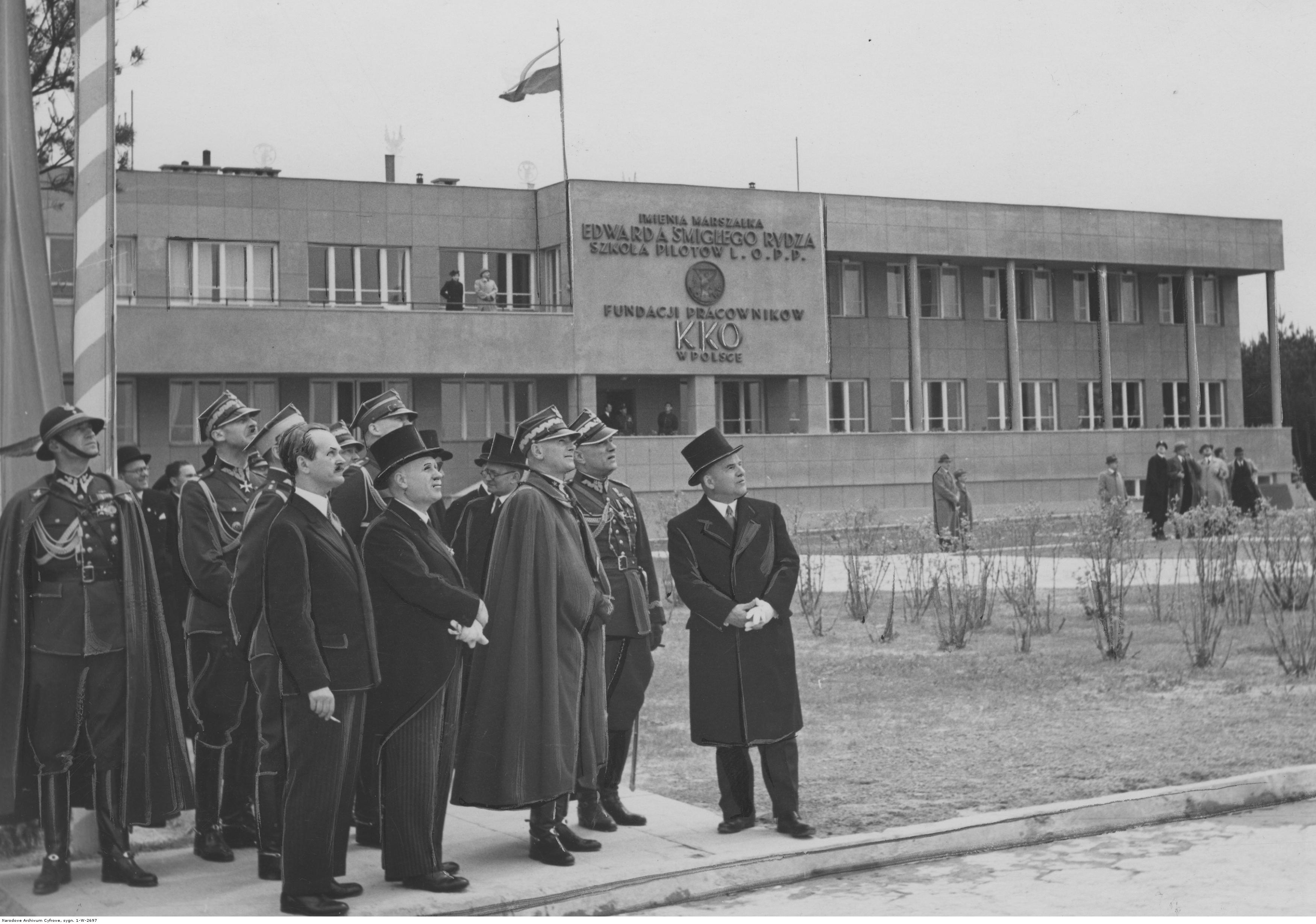 Poświęcenie szkoły pilotów LOPP w Świdniku pod Lublinem. Uczestnicy uroczystości otwarcia przed budynkiem szkoły oglądają pokaz lotniczy. Widoczni m.in.: szef komunikacji w Sztabie Naczelnego Wodza marszałka Edwarda Rydza-Śmigłego Juliusz Ulrych (1. z prawej), gen. Leon Berbecki (2. z prawej), marszałek Edward Rydz-Śmigły (3. z prawej), wojewoda lubelski Jerzy de Tramecourt (4. z prawej), wiceminister spraw wewnętrznych Władysław Korsak (w głębi, za marszałkiem Śmigłego-Rydzem, w okularach i cylindrze), gen. Kazimierz Schally (2. z lewej), major Strzelców Podhalańskich Józef Hartman (1. z lewej).